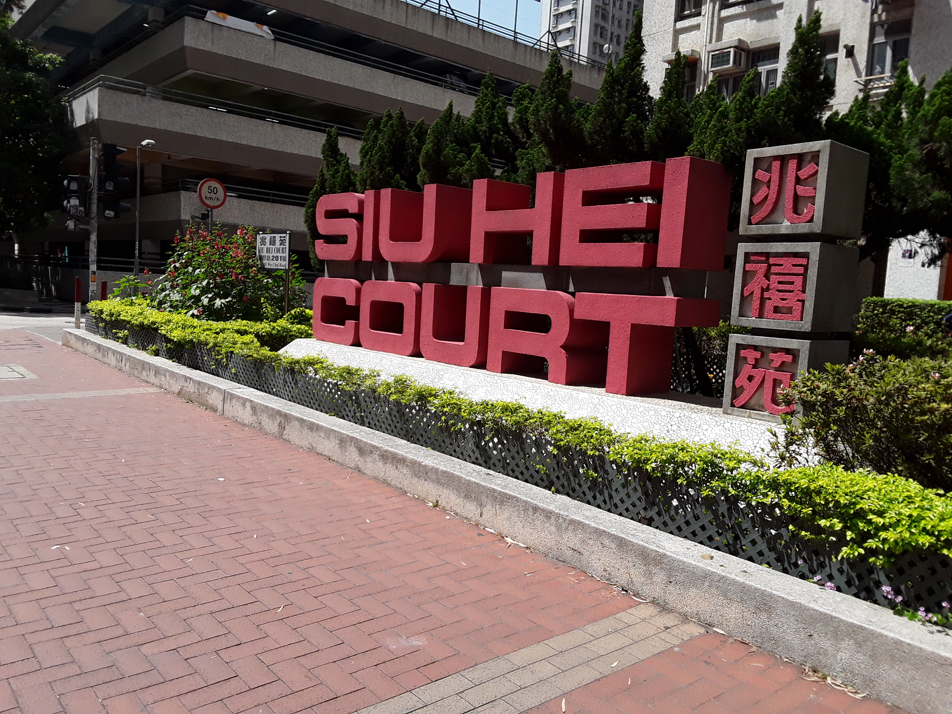 位於兆禧苑宏禧閣地下對出花圃